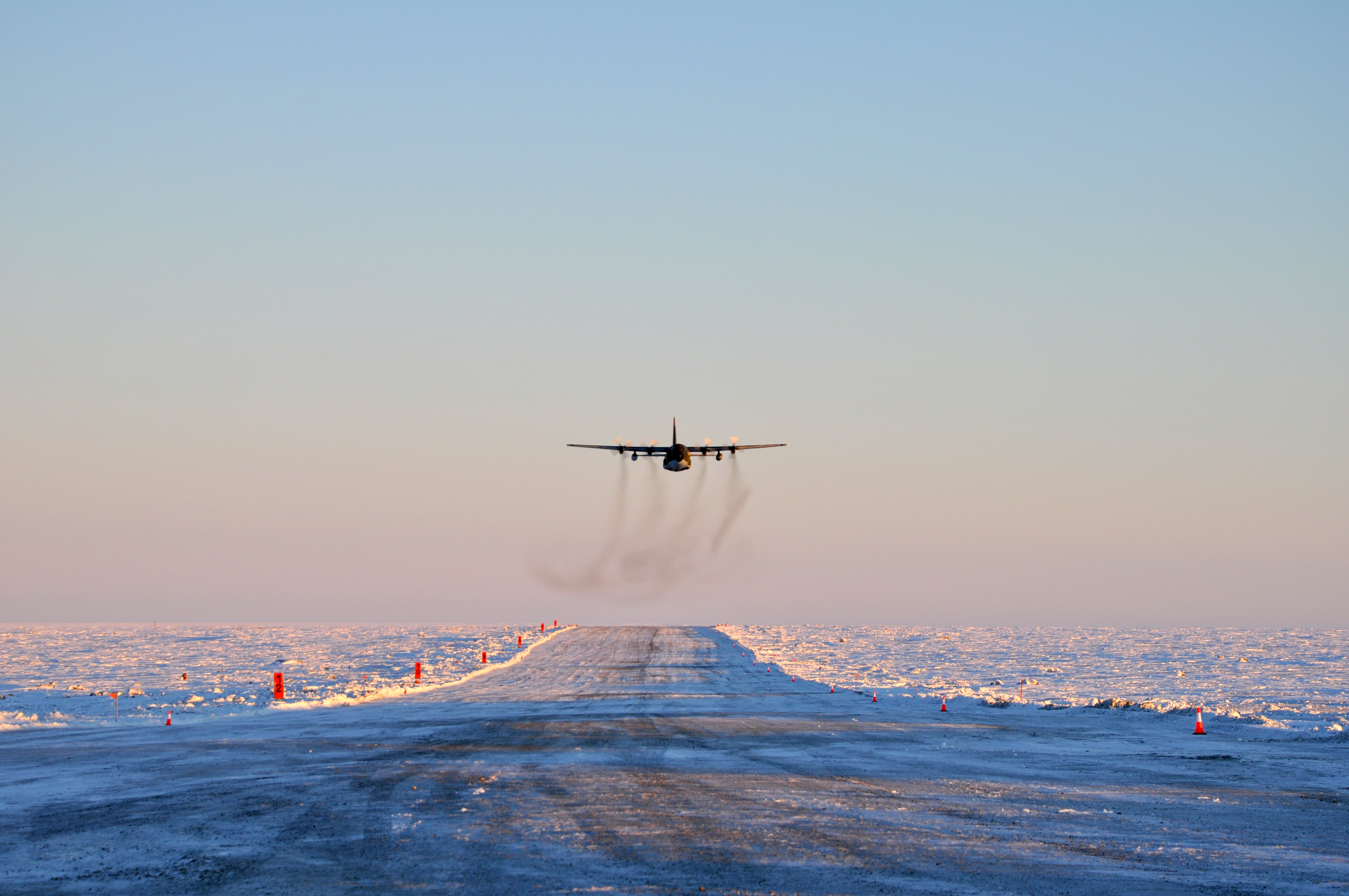 Un C-130 Hercules de la Fuerza Aerea Argentina sobre la Base Marambio, Antartida Argentina.